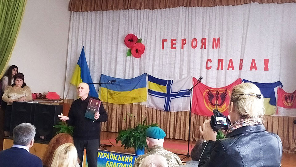 Урок мужественности в Марьевской школе